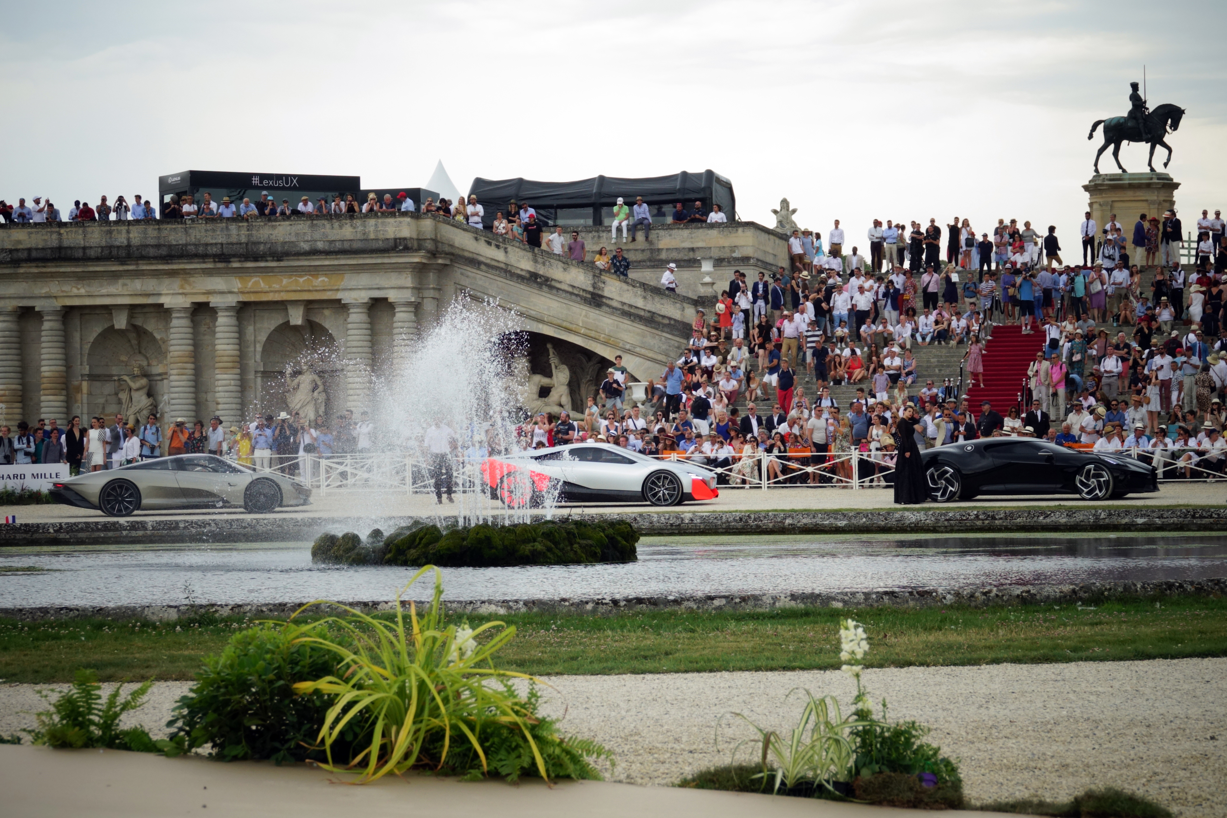 Concours d'élégance du Chantilly Arts & Elegance Richard Mille 2019